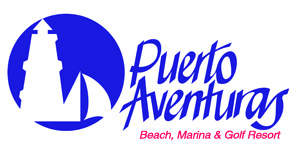 Logotipo institucional de Puerto Aventuras